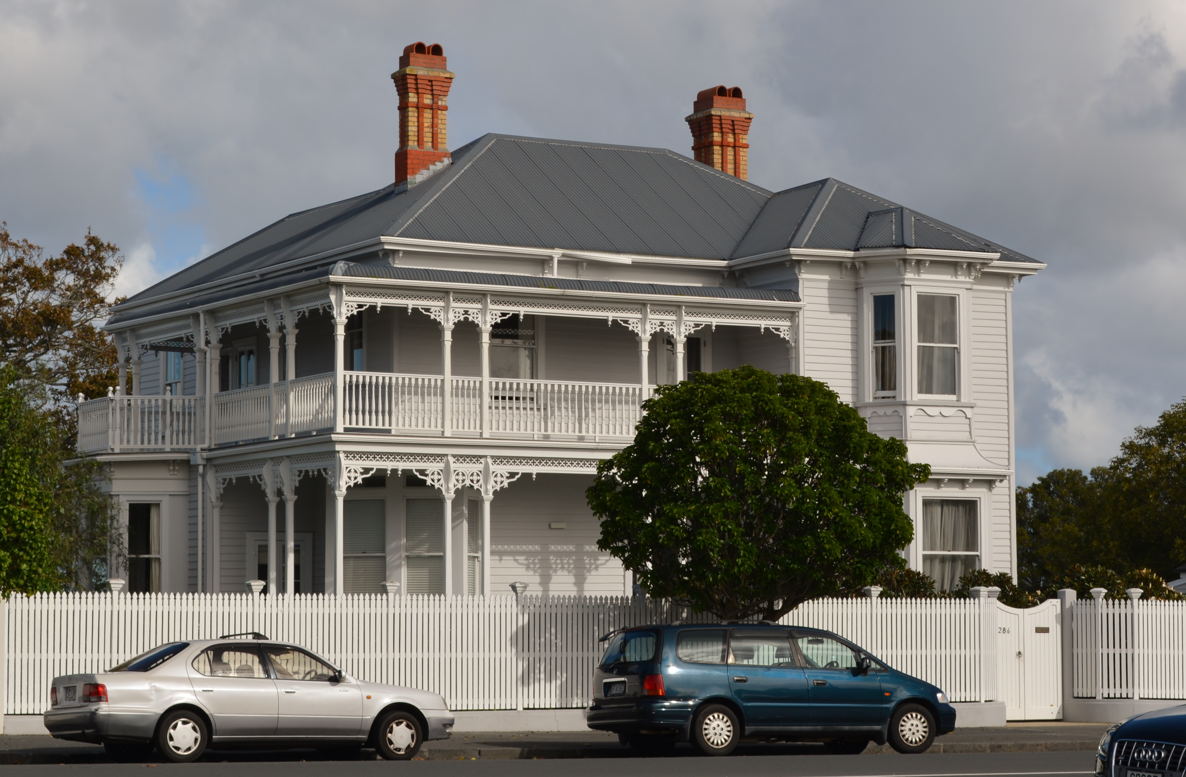 Auckland,New Zealand